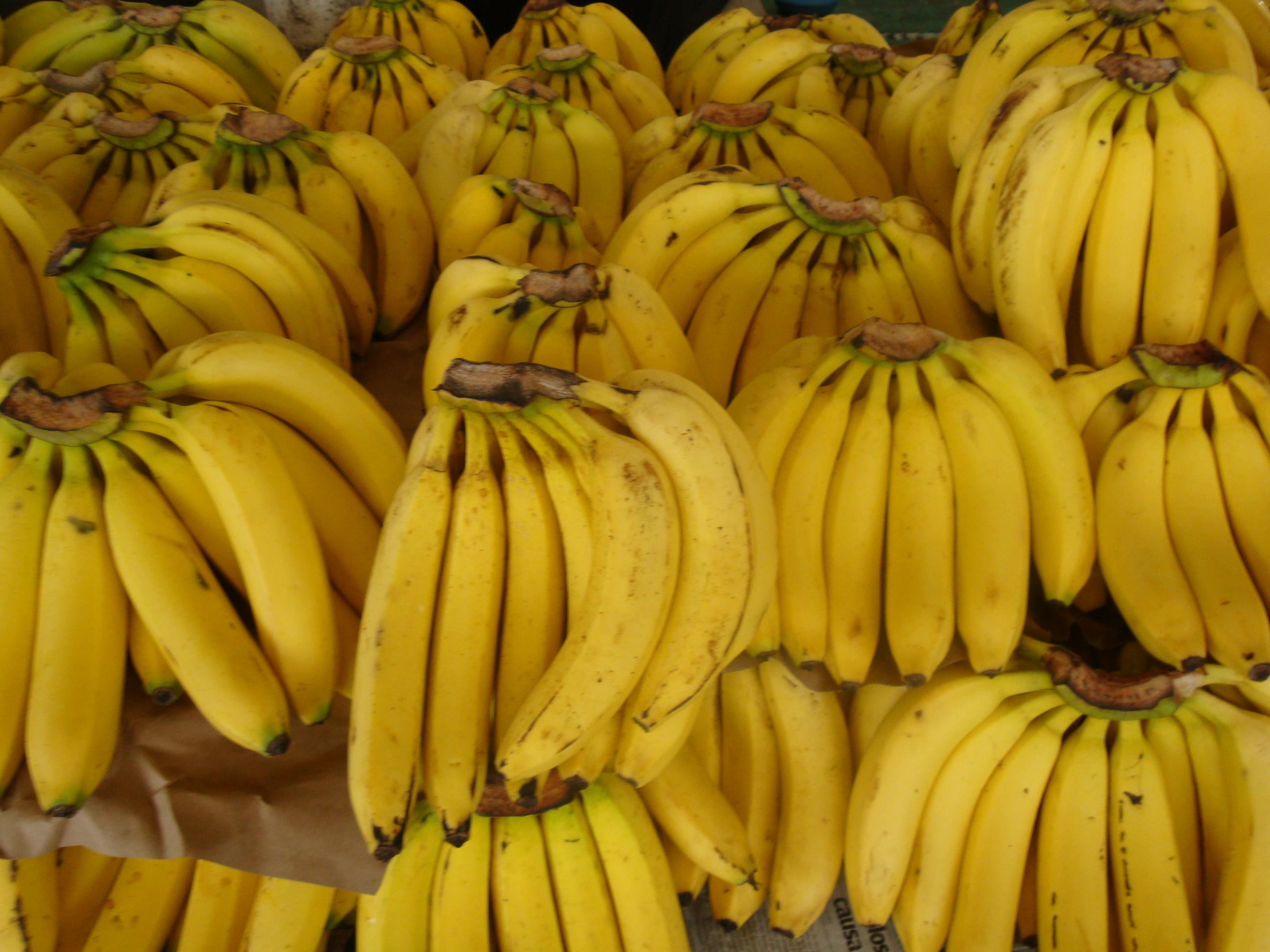 Platano "Tabasco" una especie de la fruta llamada "Banano" que se cultiva en el estado mexicano de Tabasco